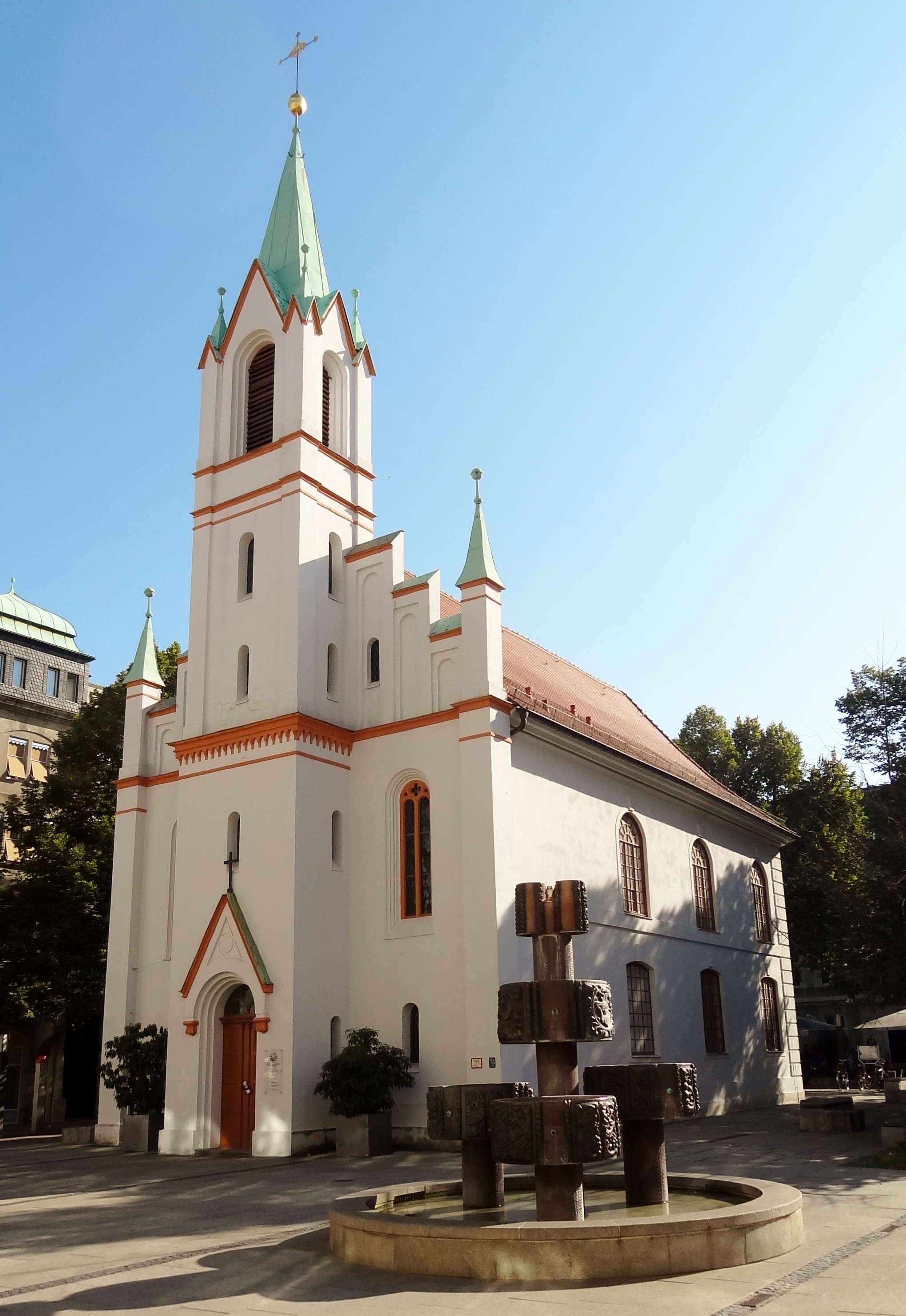 Schlosskirche-Ansicht